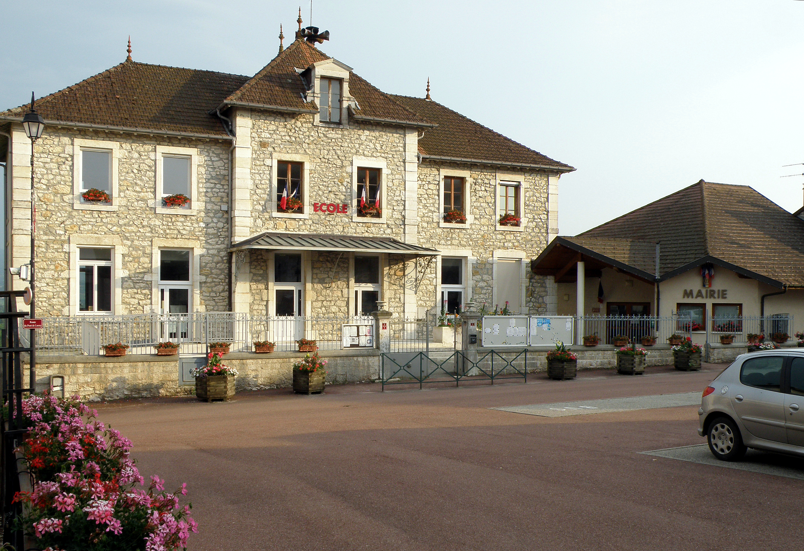 Massignieu-de-Rives, comm. du département de l’Ain (région Rhônes-Alpes, France). École (à gauche) et mairie (à droite), place de la Fontaine, dans le bourg-centre.